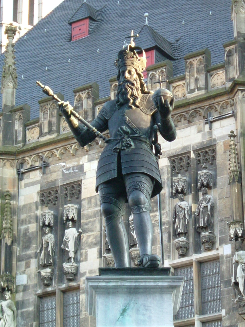 Karlsbrunnen in Aachen mit dem Aachener Rathaus im Hintergrund